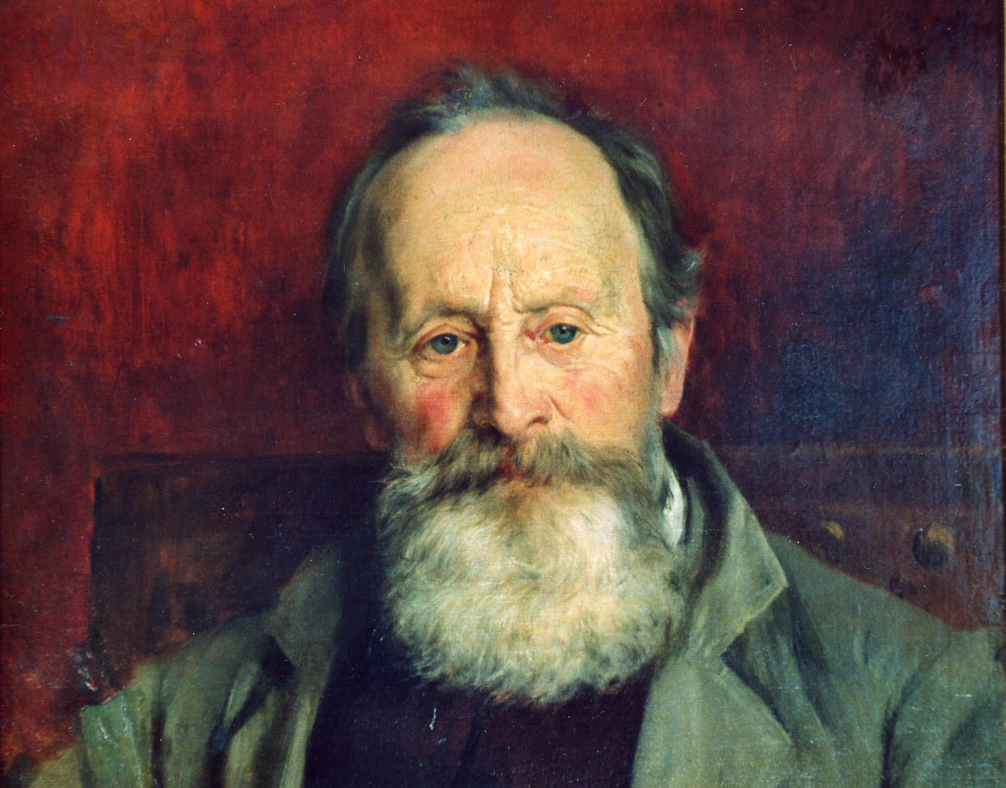 Charles Soubre (1821-1895) par Emile Delperée